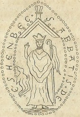 Karl Hansens aftegning af abbed Jonas af Essenbæk Kloster's segl fra 1490.